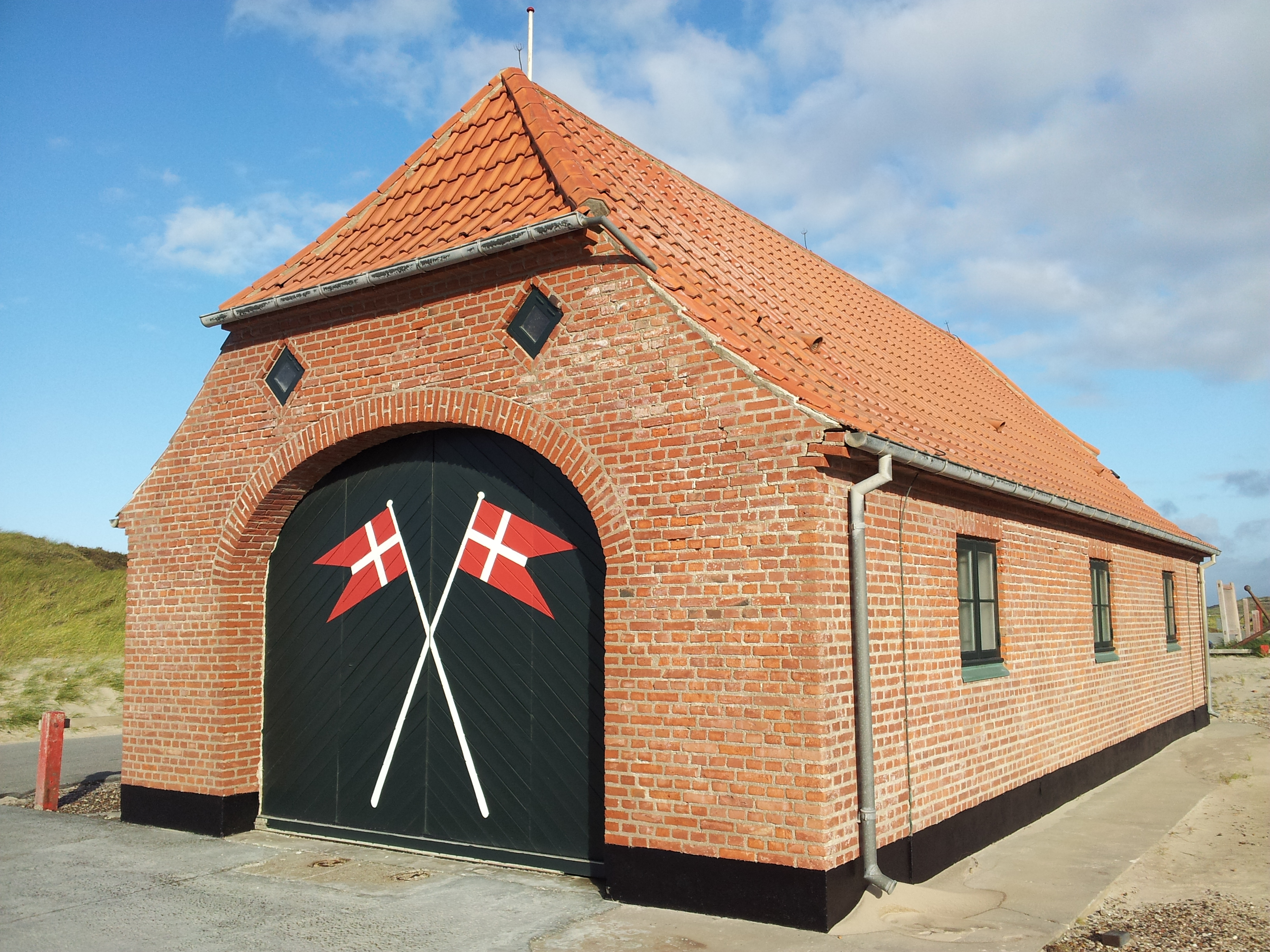 Stenbjerg Redningsstation